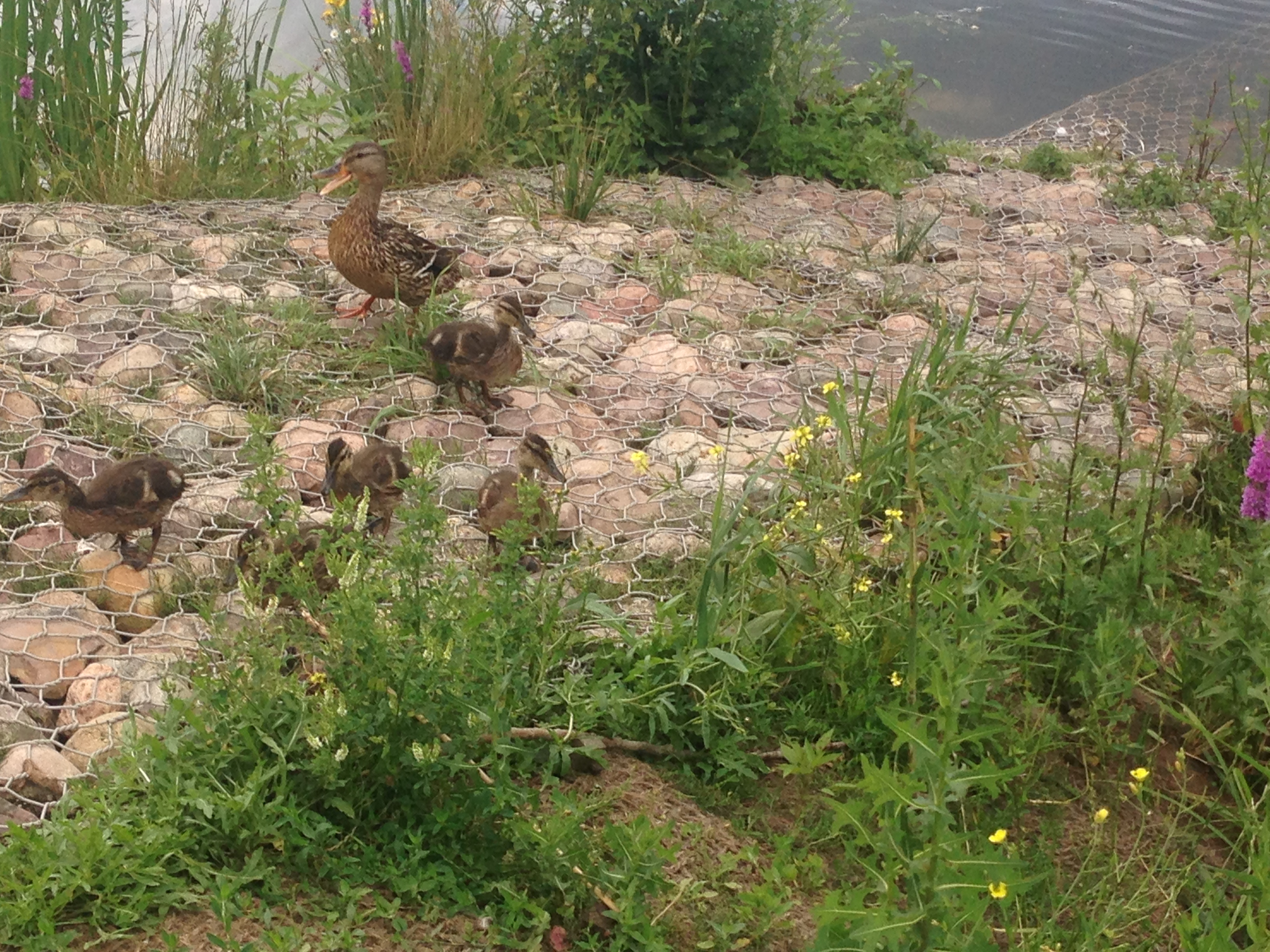 rodzina kaczek krzyżówek, staw Piekarnicza w Gdańsku (Piecki-Migowo).